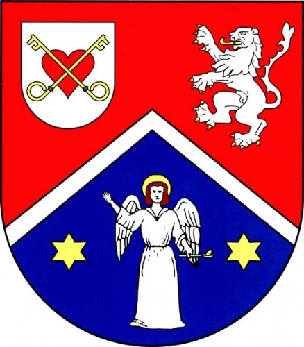 znak, Vícenice u Náměstě nad Oslavou, okres Třebíč